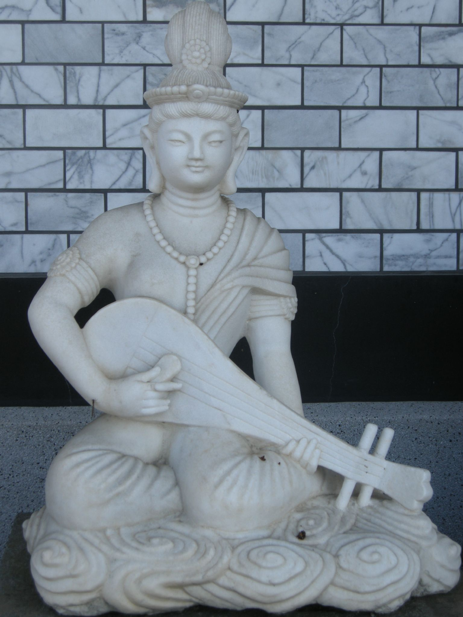 Dea della musica, delle arti e dell'eloquenza